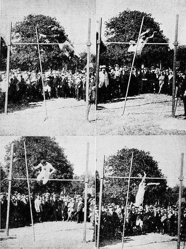 Fernand Gonder en 1899, p.451, 452